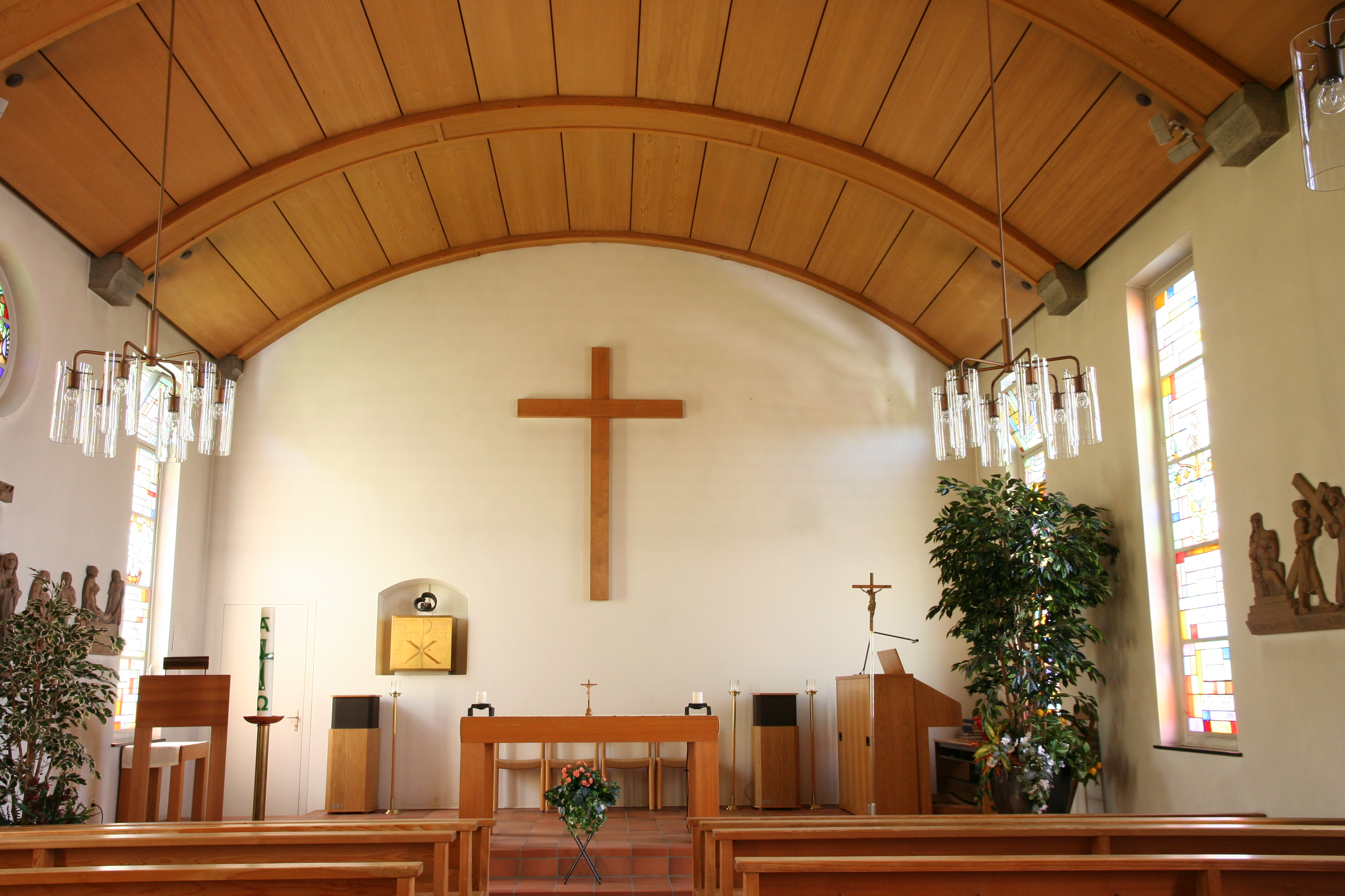 Römisch-katholische Kirche Liebfrauen Oberstammheim, Innenansicht